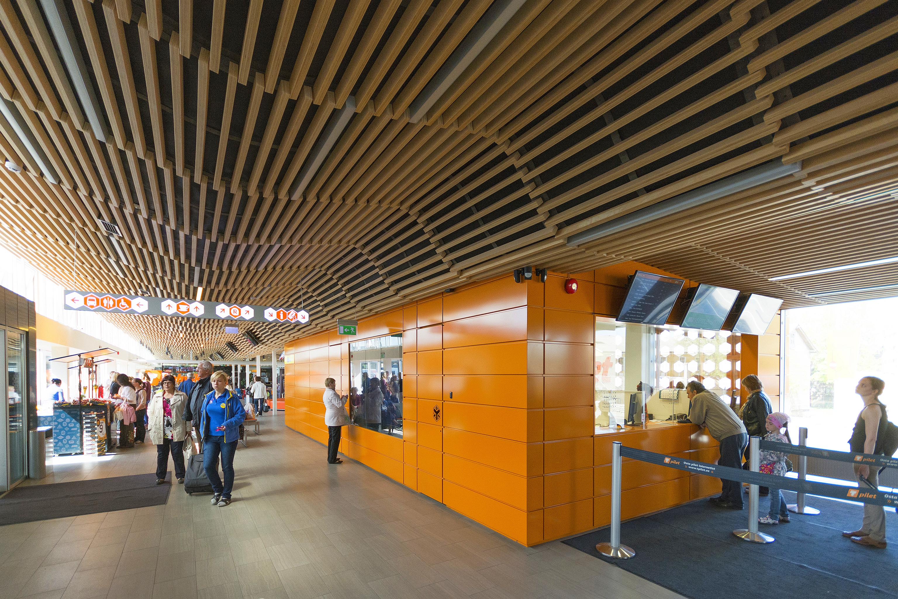 Renovated Tallinn main bus terminal interior